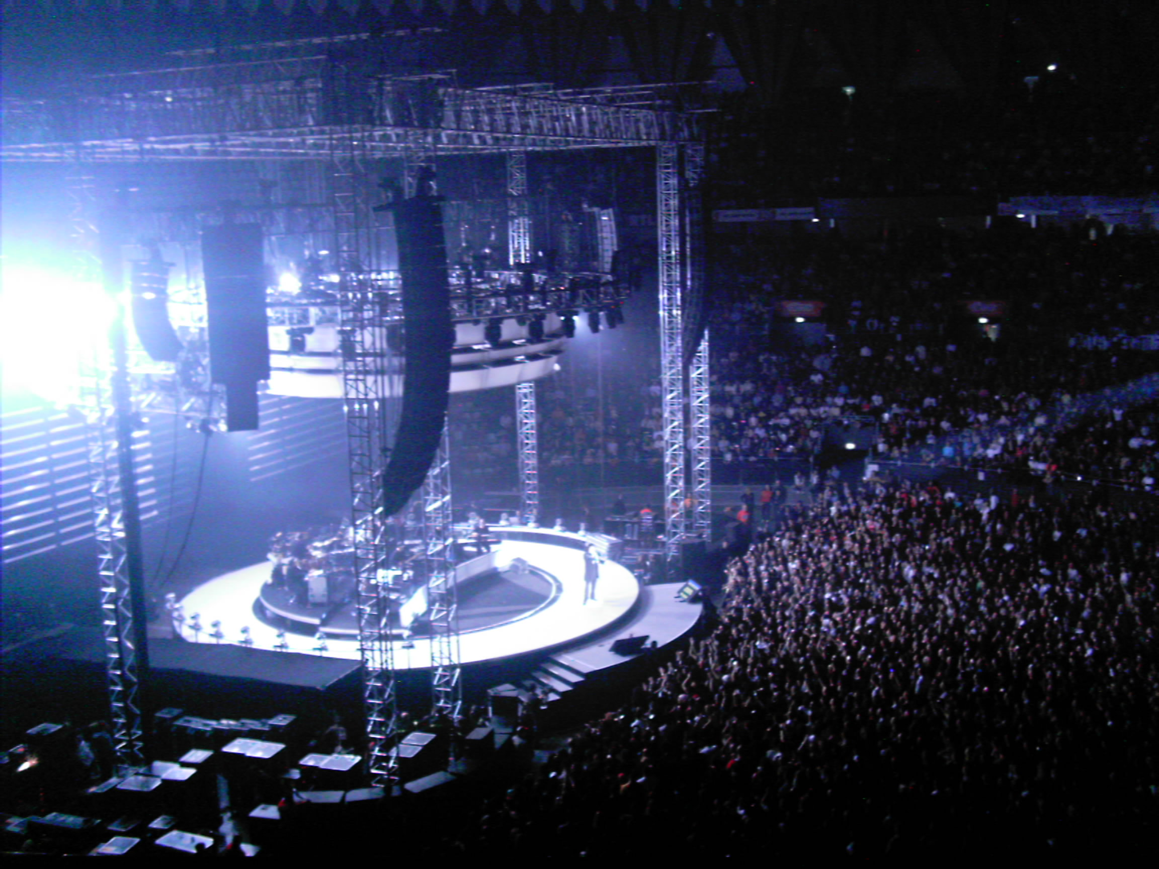 Foto del Concerto Zero Movimento a Roma nel marzo 2006